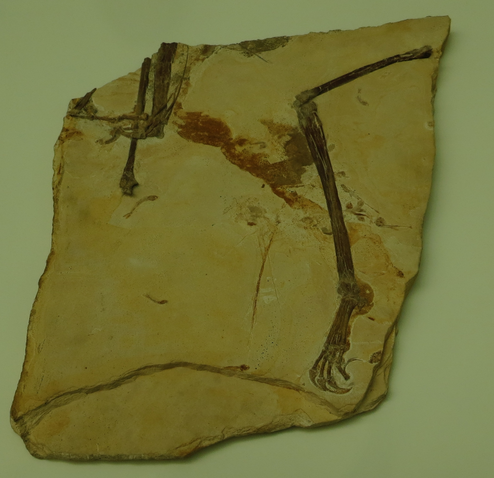 Fossil - Took the picture at Natural History Museum, Karlsruhe